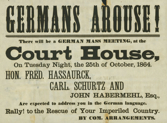 Aufruf zu einer Wahlveranstaltung im Präsidentschaftswahljahr 1864 mit Friedrich Hassaurek und Carl Schurtz